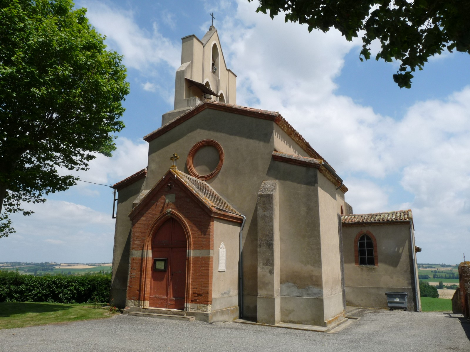 Eglise de Francarville, Haute-Garonne, France